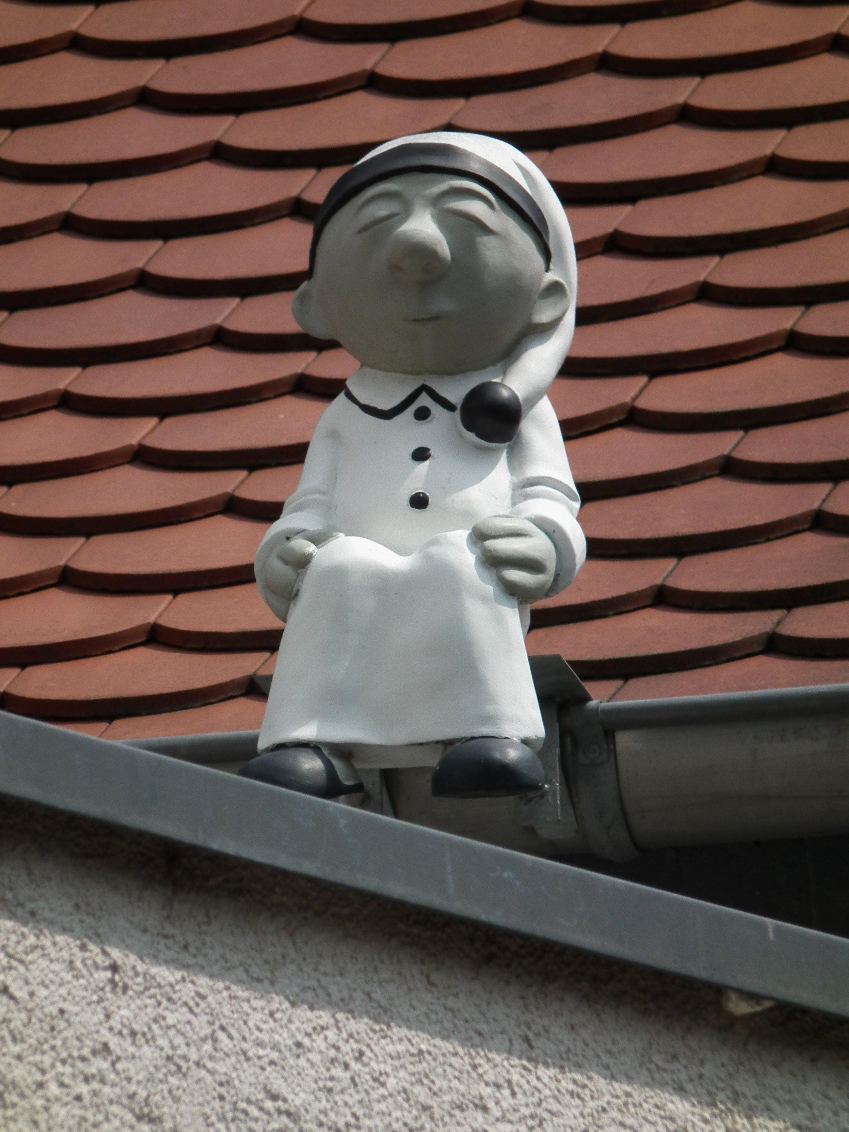 Figur auf Dach, fotografiert in Guntersblum (Rheinland-Pfalz, Deutschland